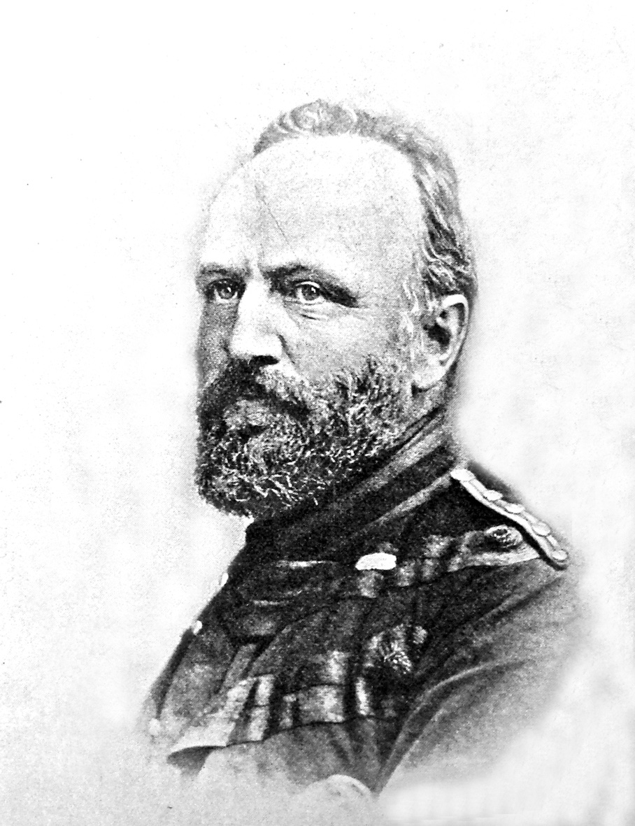 Enrico Mylius Dalgas (1828 - 1894), dansk officer og vejingeniør. Han var en af de ledende kræfter bag opdyrkningen af heden, medstifter af Det danske Hedeselskab i 1866 og selskabets første direktør 1866 - 1894.